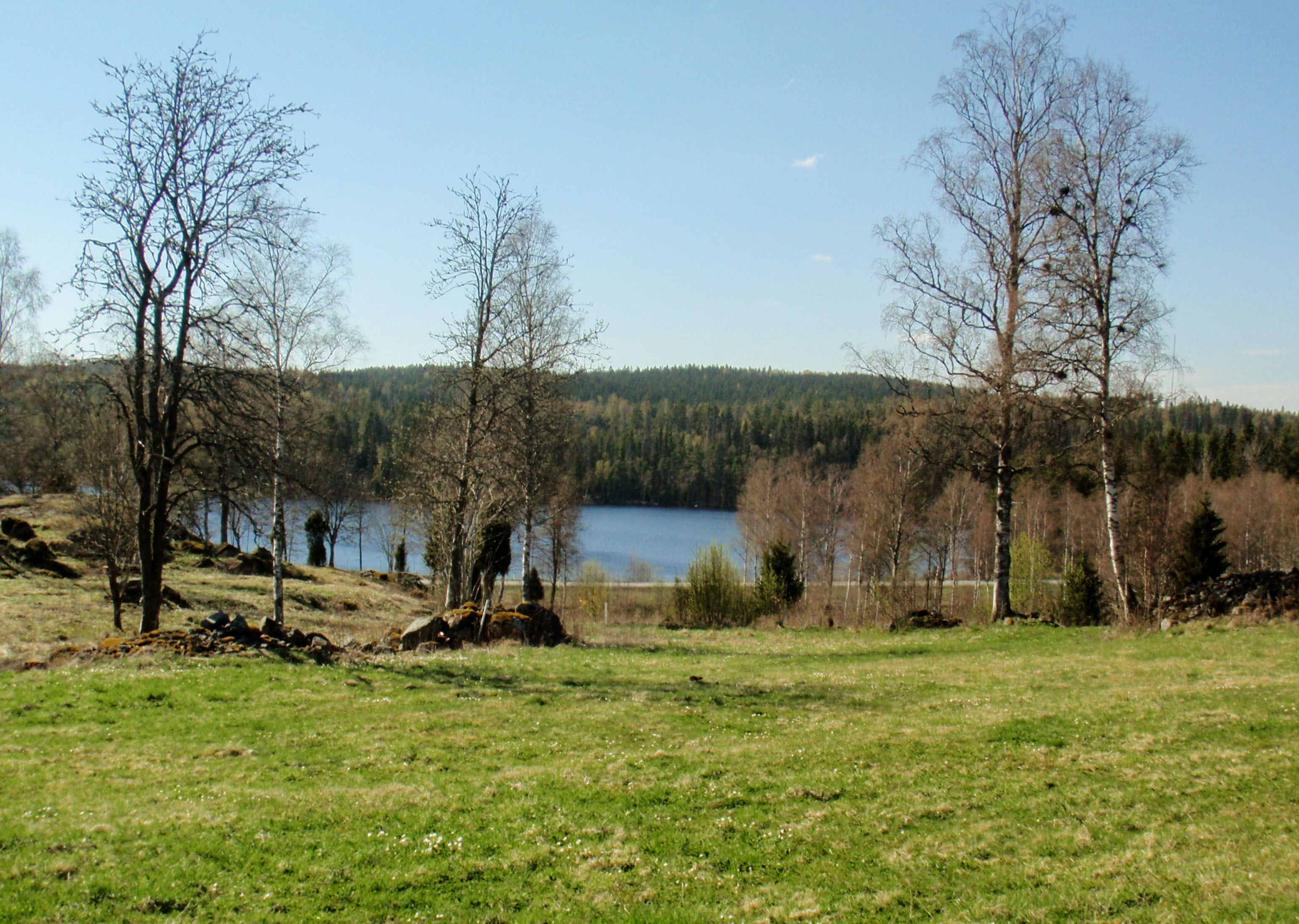 Hedasjön, (Södra Solberga socken, Småland)